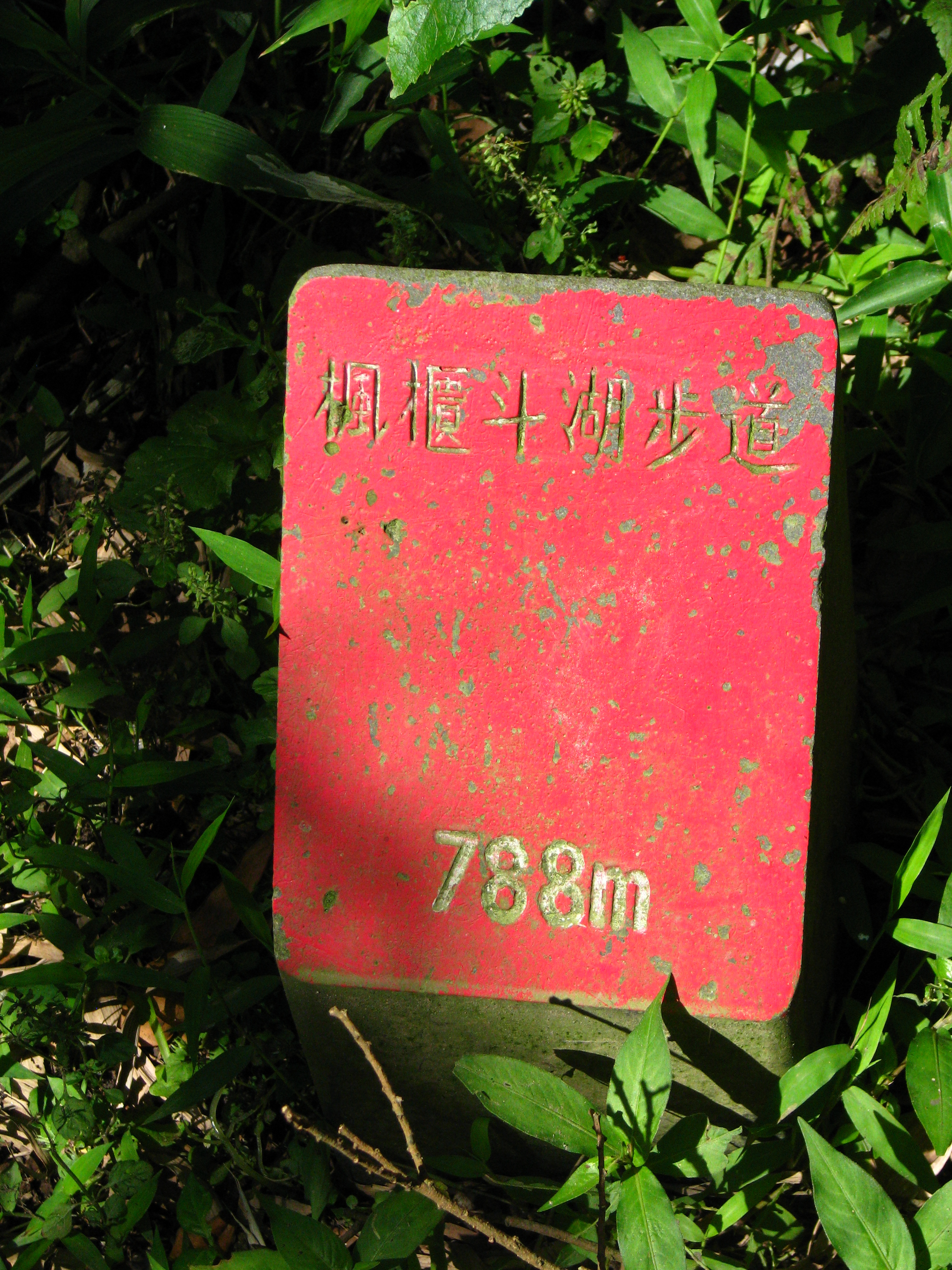 風櫃斗湖步道里程碑。